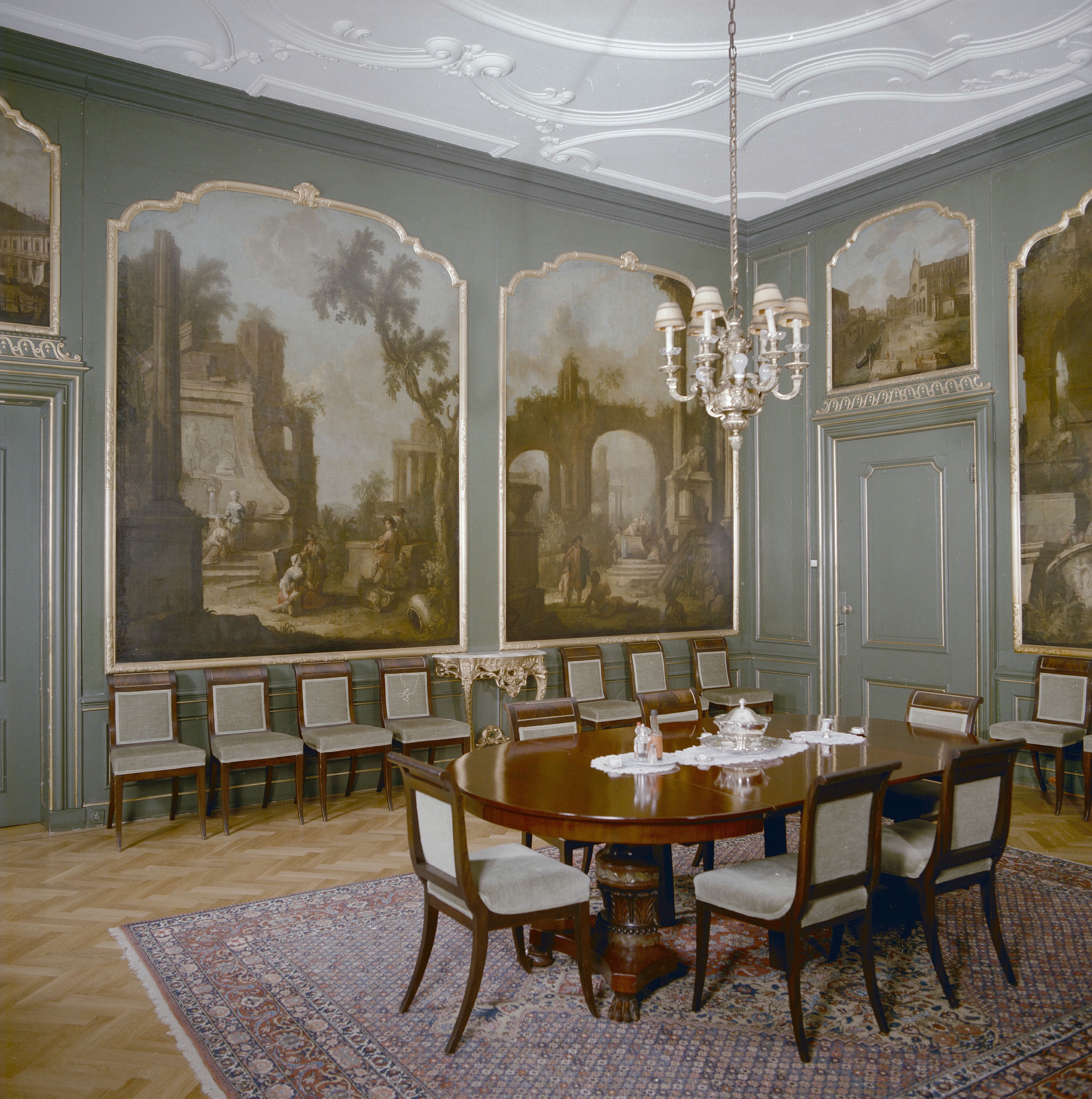 Turkse Ambassade: interieur eetkamer begane grond